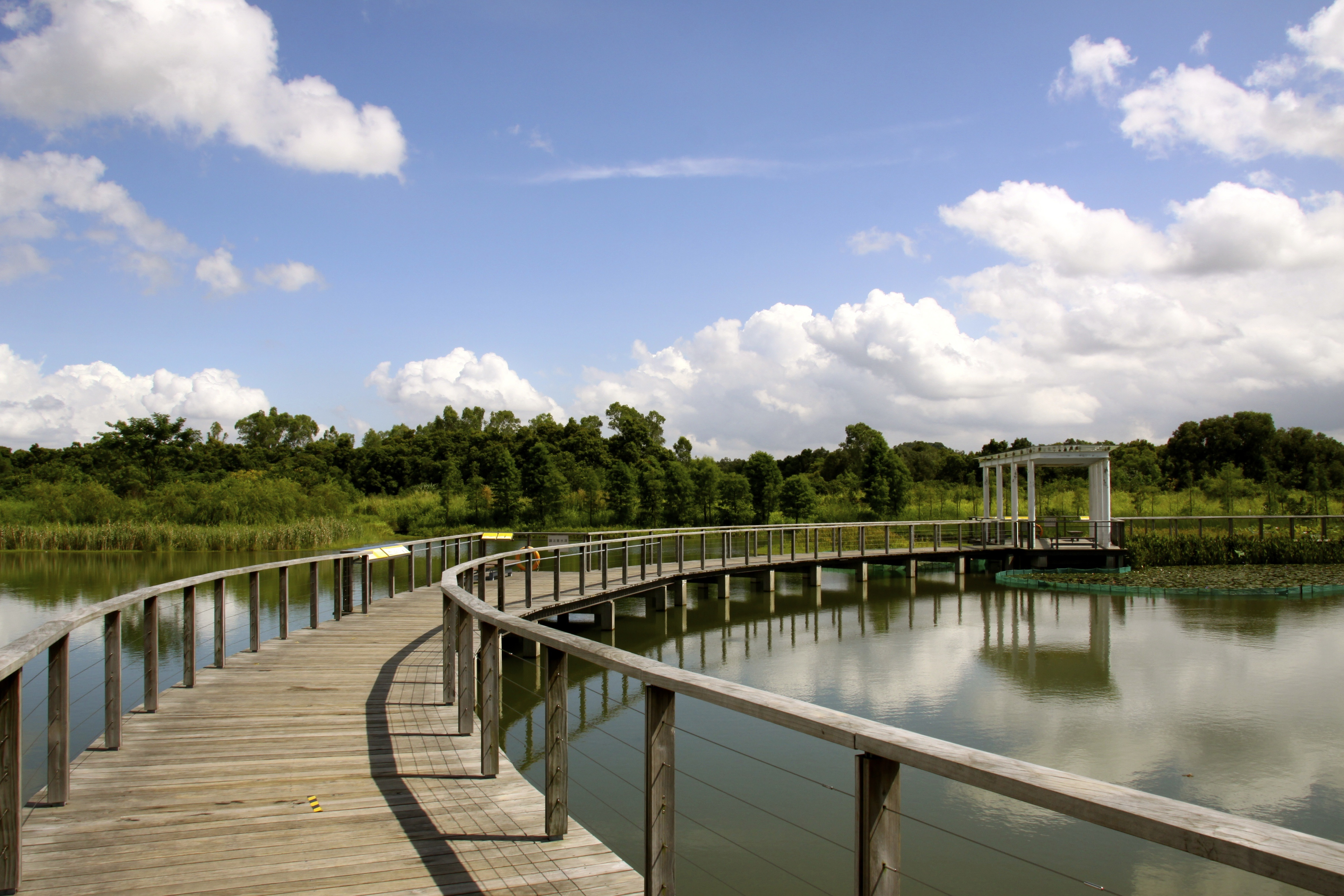 Hong Kong Wetland Park